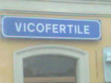 Opera propria. Stazione ferroviaria di Vicofertile.